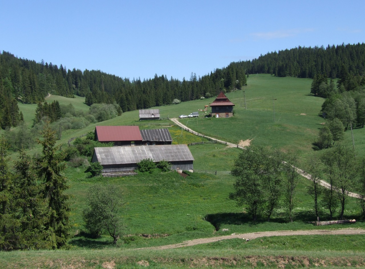 Jurgowskie Stajnie w 2009 (Spisz Polski)